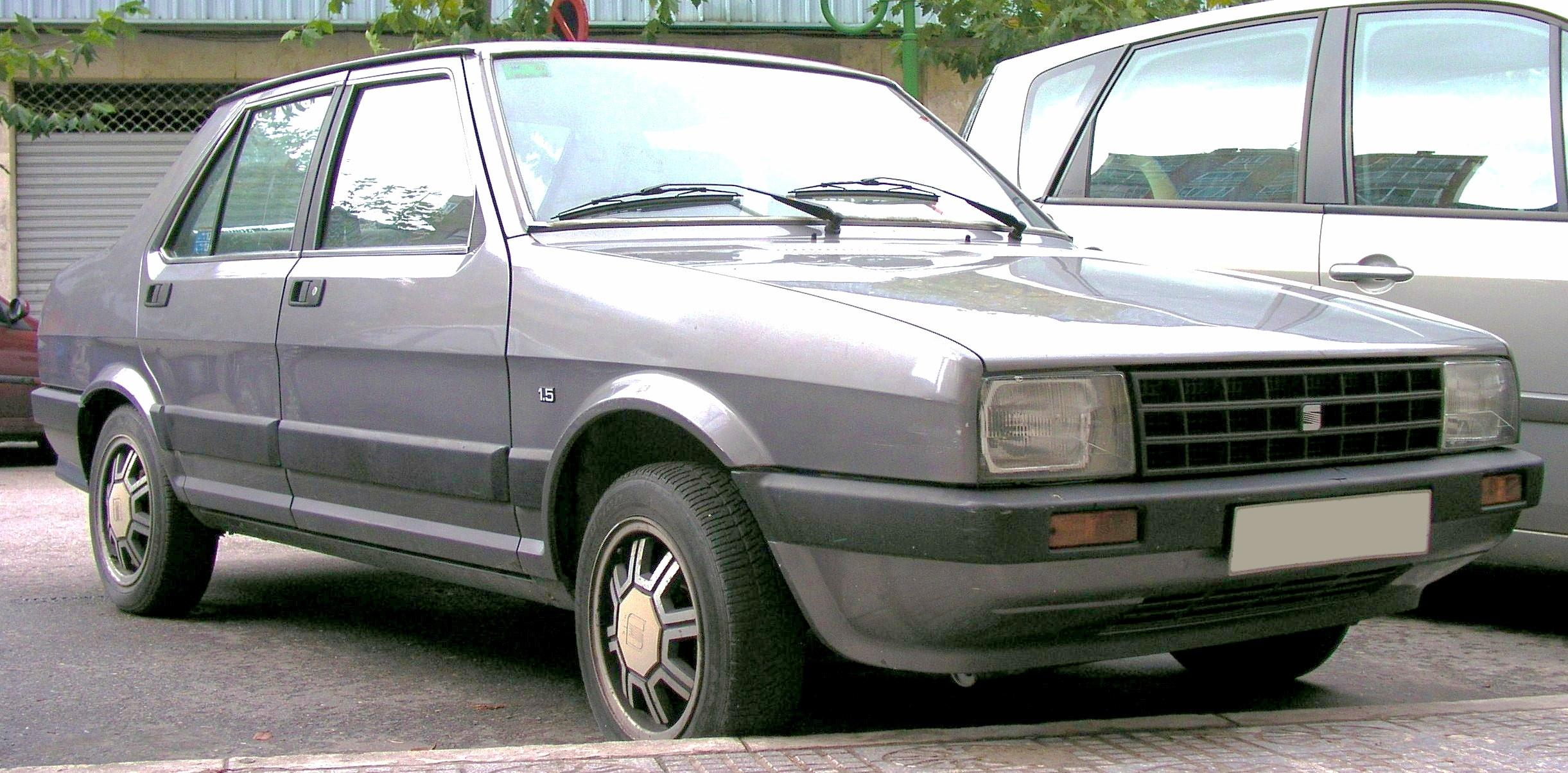 1986 SEAT Málaga GLX (luxury trim).